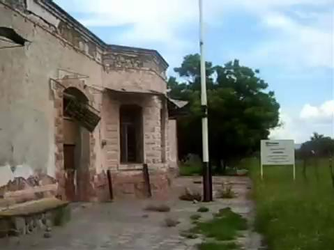 Antigua estación del ferrocarril de Axochiapan, Morelos.